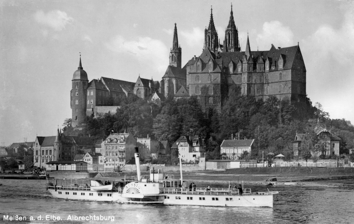 Meißen; Albrechtsburg und Dom - Elbe mit Dampfer Aussig This postcard is from publisher Brück & Sohn in Meißen ( postcard has a unique number 26346 and is available in a higher resolution at the publisher. This images was uploaded in a cooperation project between Wikipedians and the publisher.